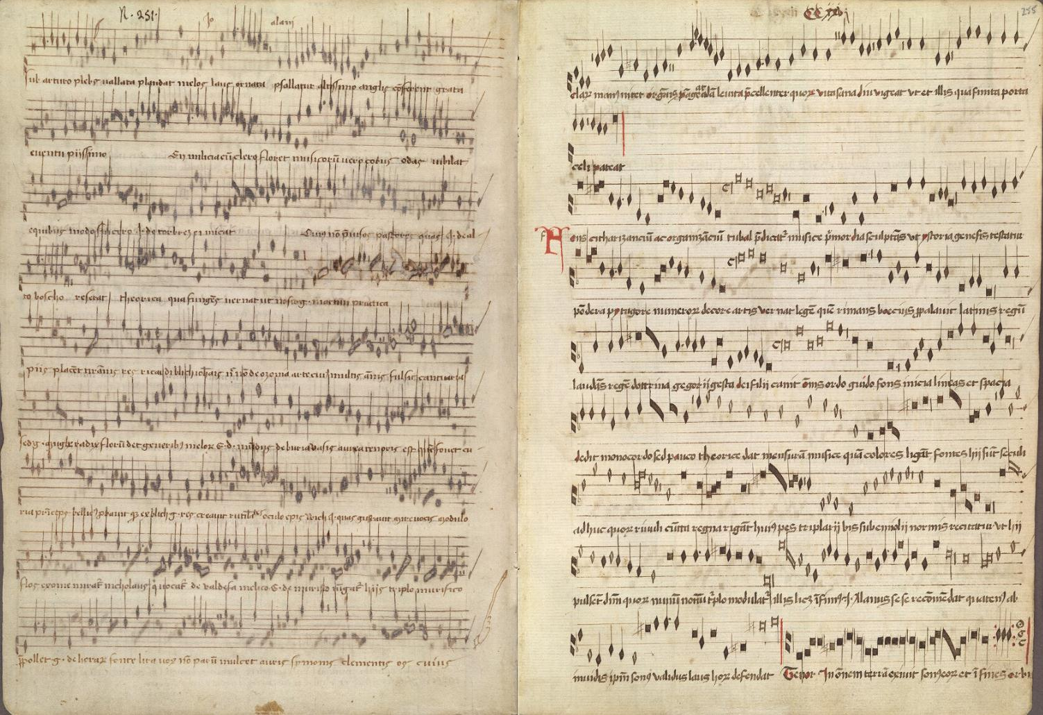 Bologna: Civico Museo Bibliografico Musicale, Ms Q 15